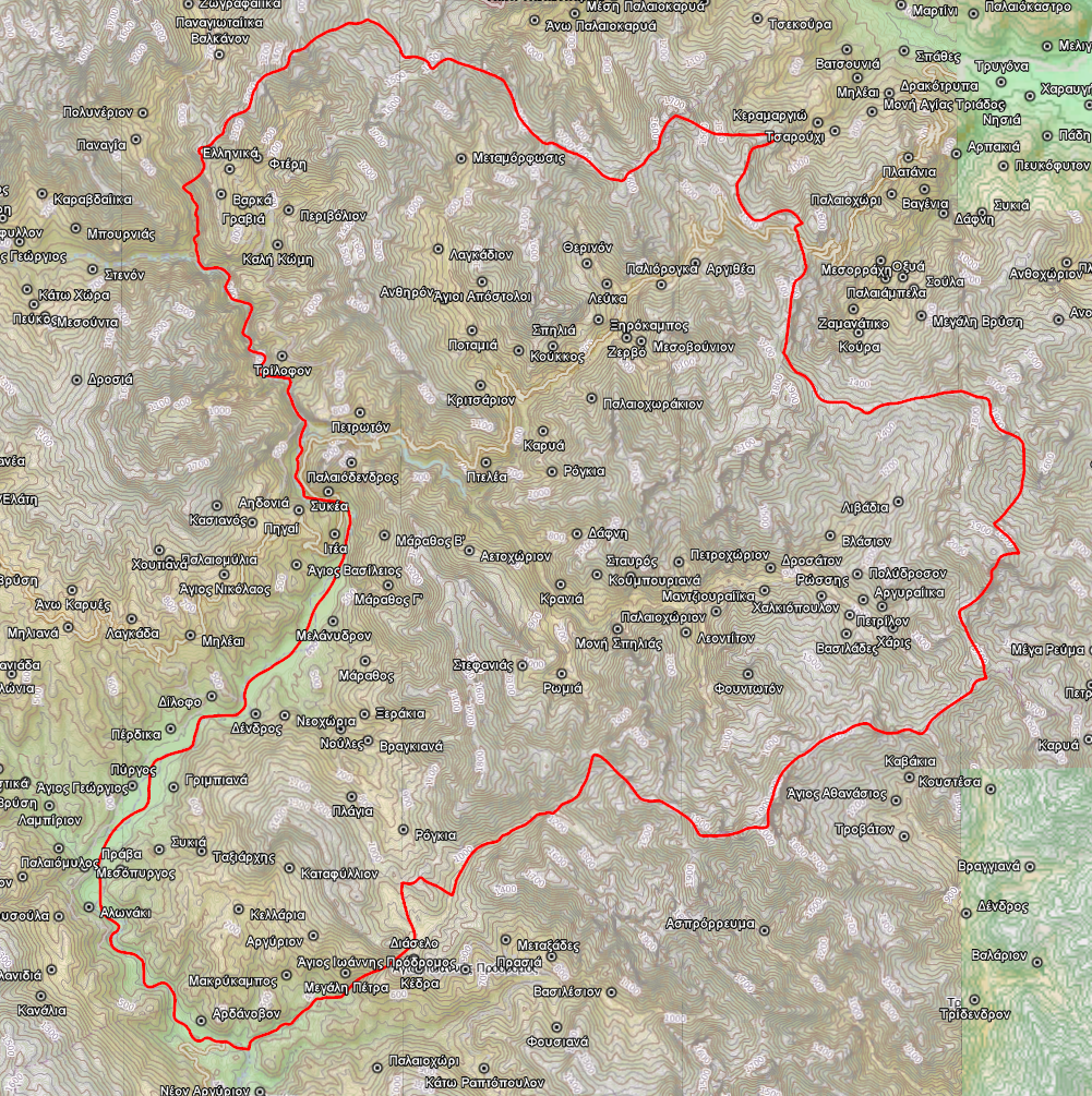 Τοπογραφικός χάρτης του Δήμου